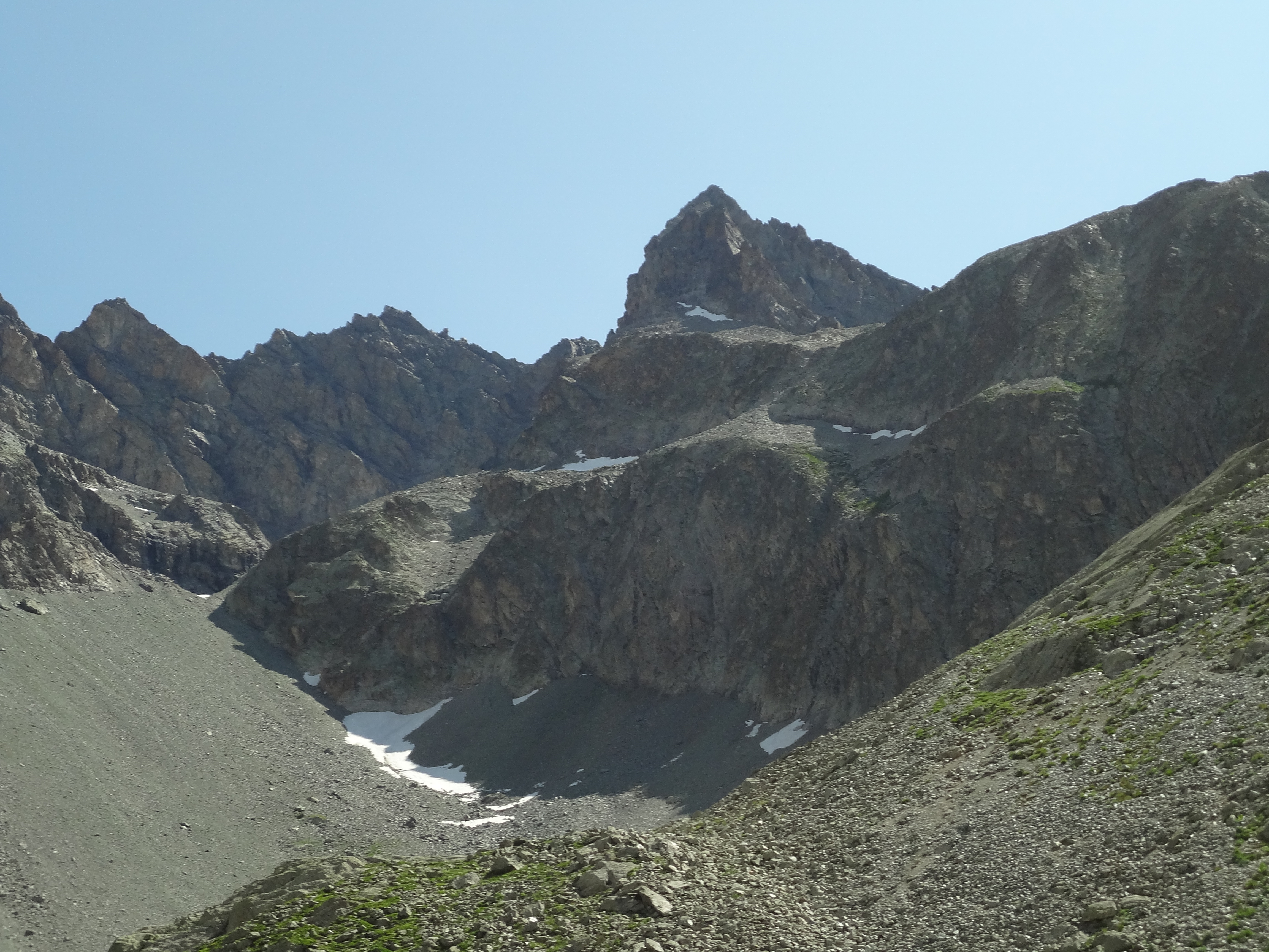 Montagne des Agneaux, vue du lac situé en-dessous du refuge du Glacier Blanc (lac Tuckett)